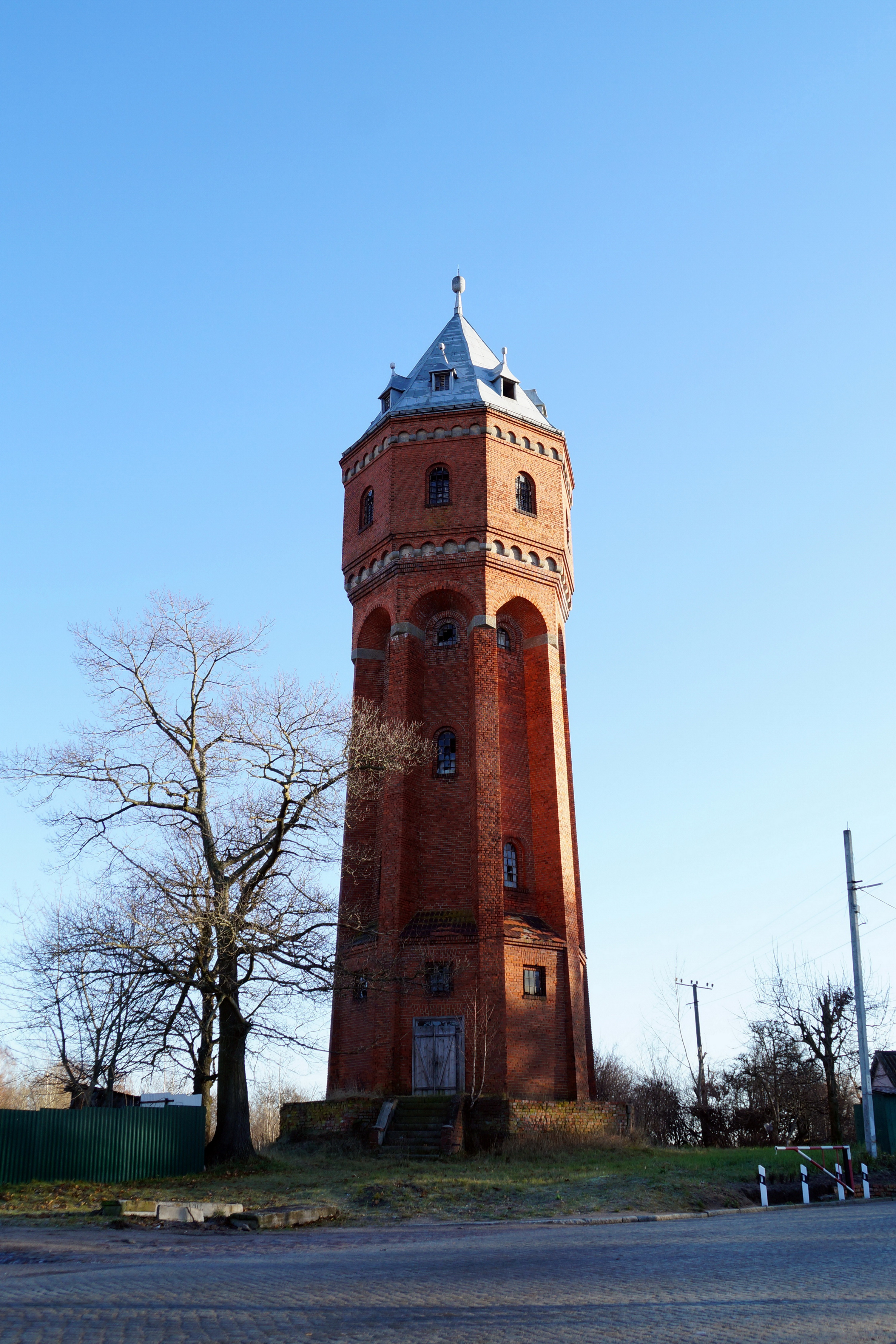 Водонапорная башня: улица Ленина, Знаменск, Гвардейский район, Калининградская область